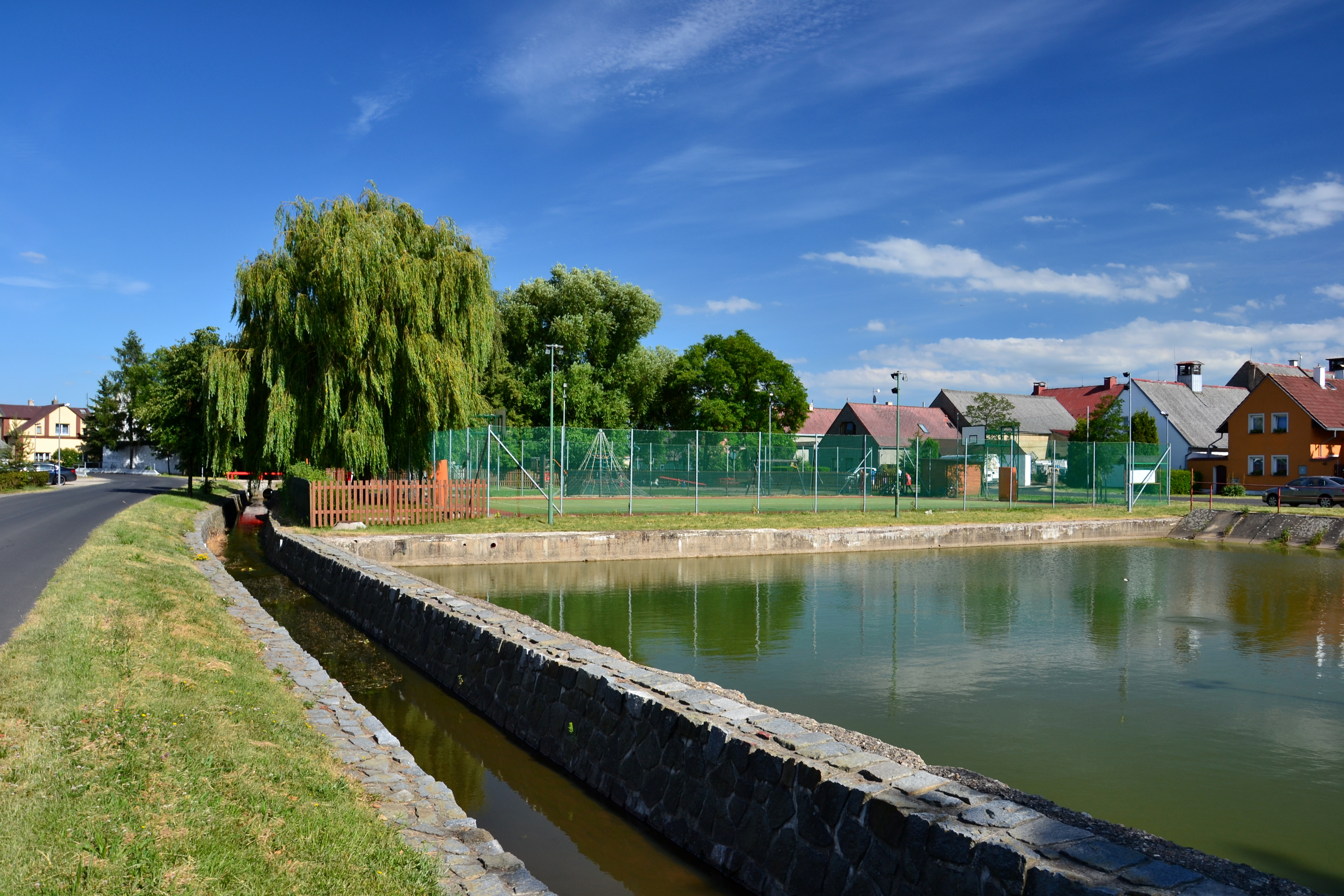 Otvice - vodní nádrž a hřiště